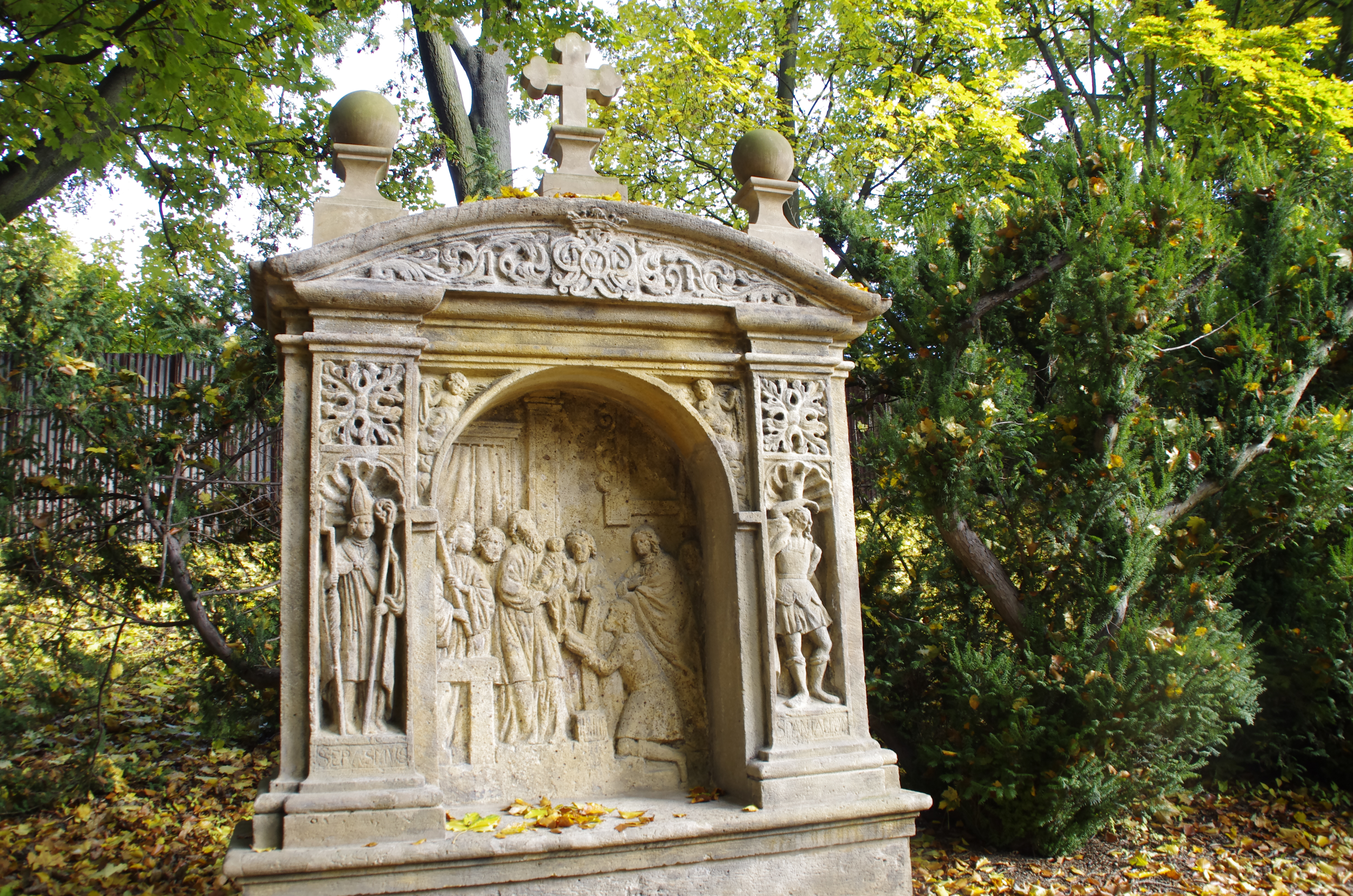 Součást cyklu výklenkových kaplí Sedm bolestí Panny Marie, nachází se v zámeckém parku v Klášterci nad Ohří